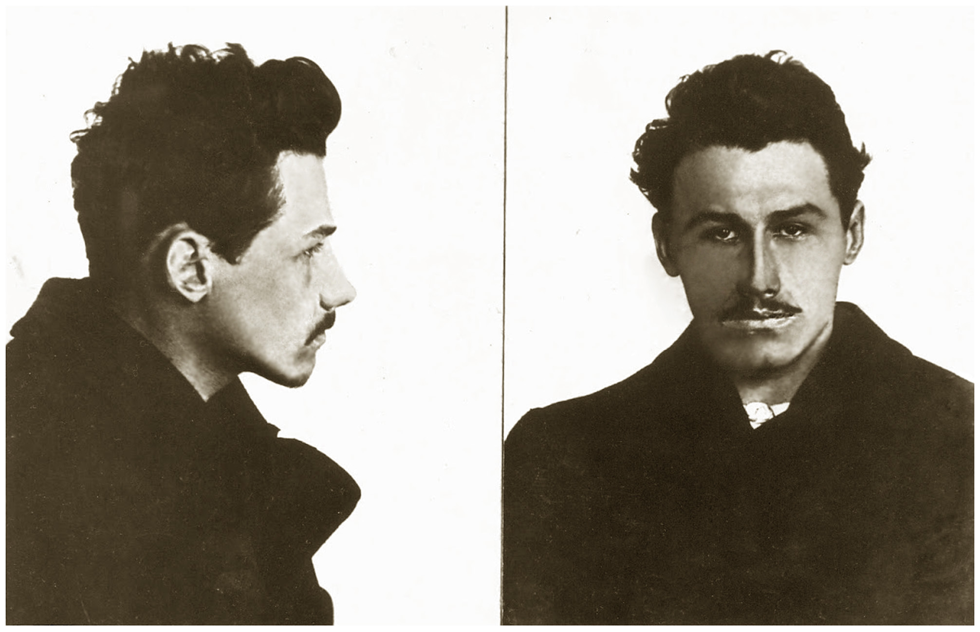 Член «Боевой организации» партии социалистов-революционеров Борис Николаевич Никитенко. Тюремный снимок